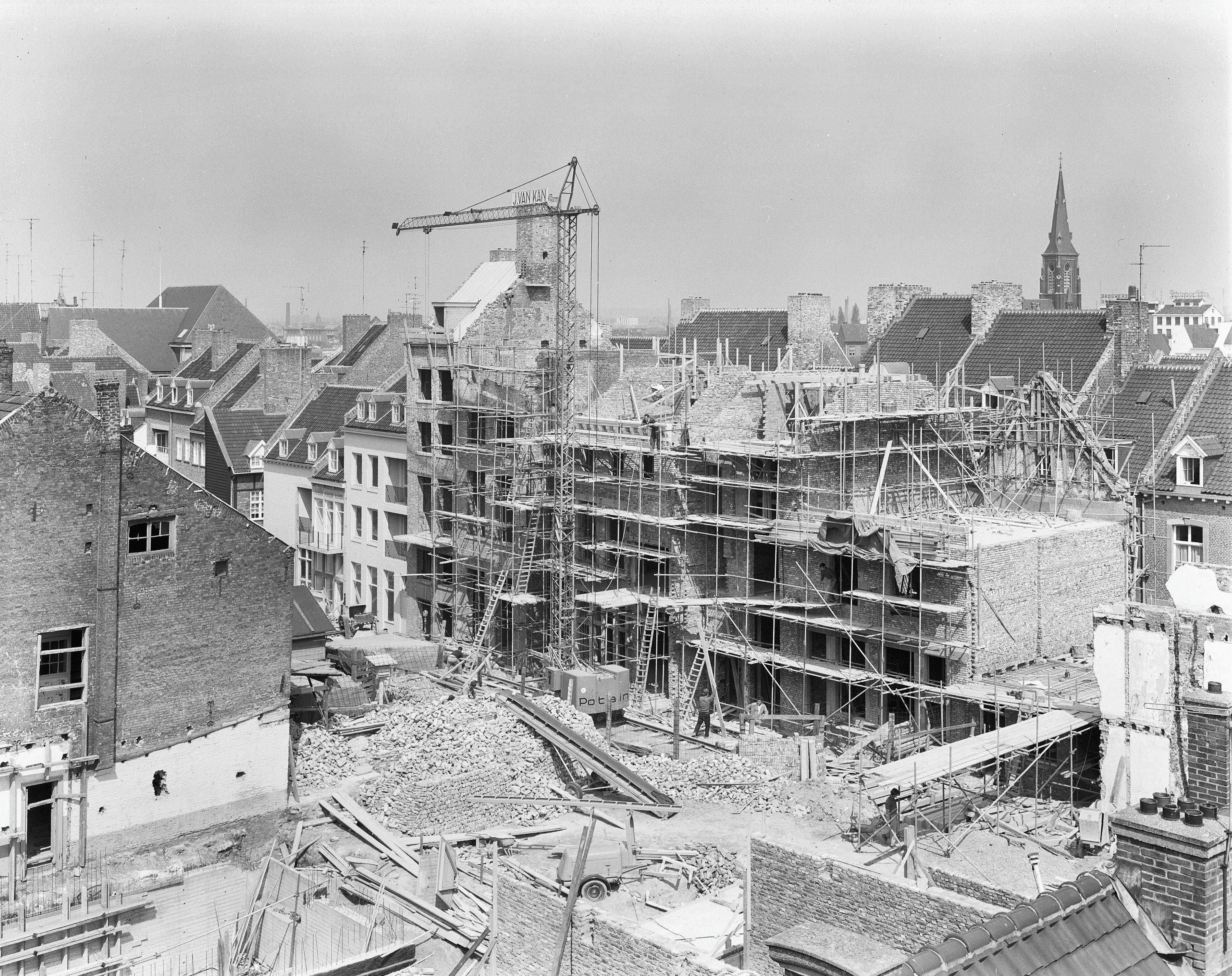 vanaf Hotel Derlon